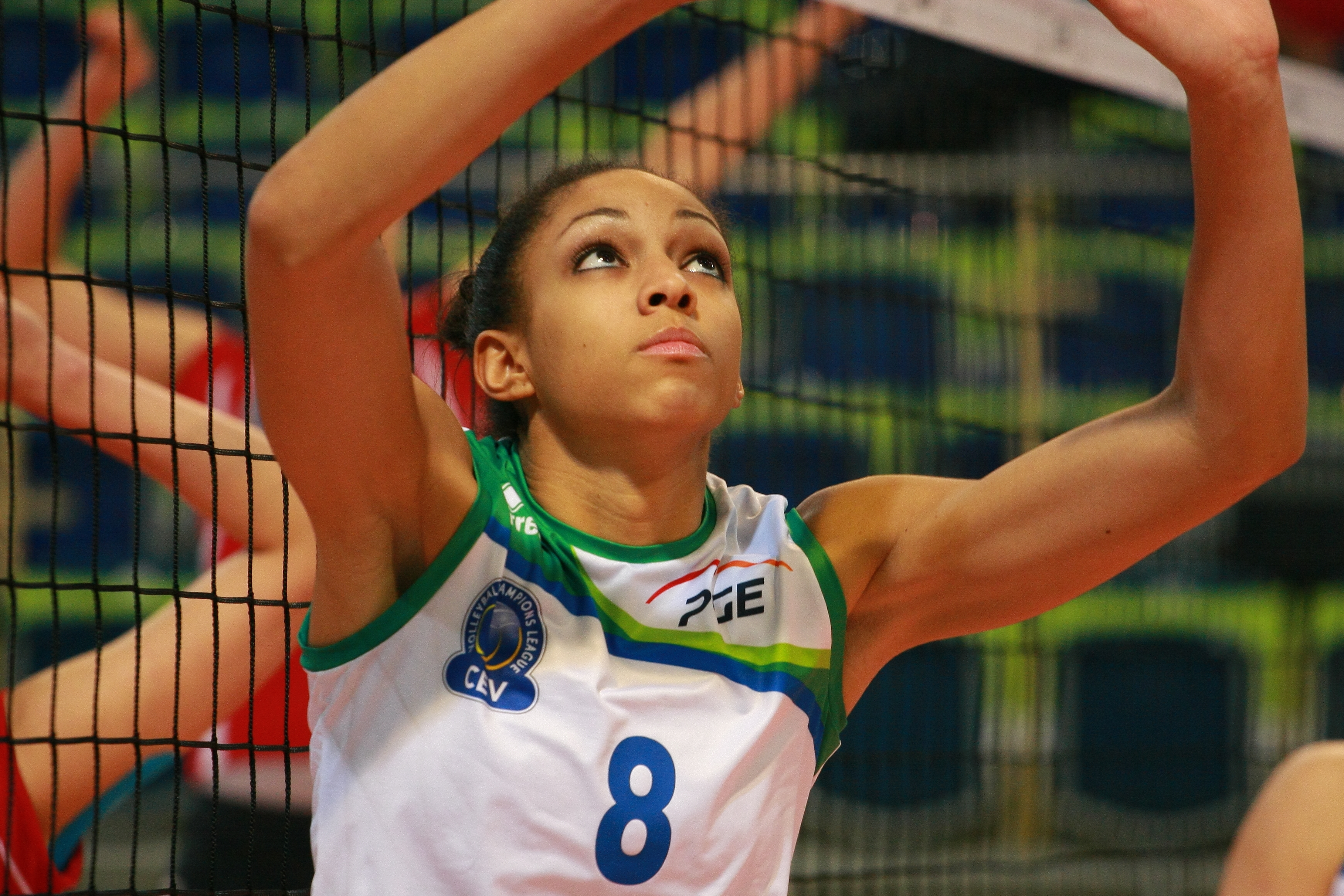 Atom Trefl Sopot vs Volero Zurich